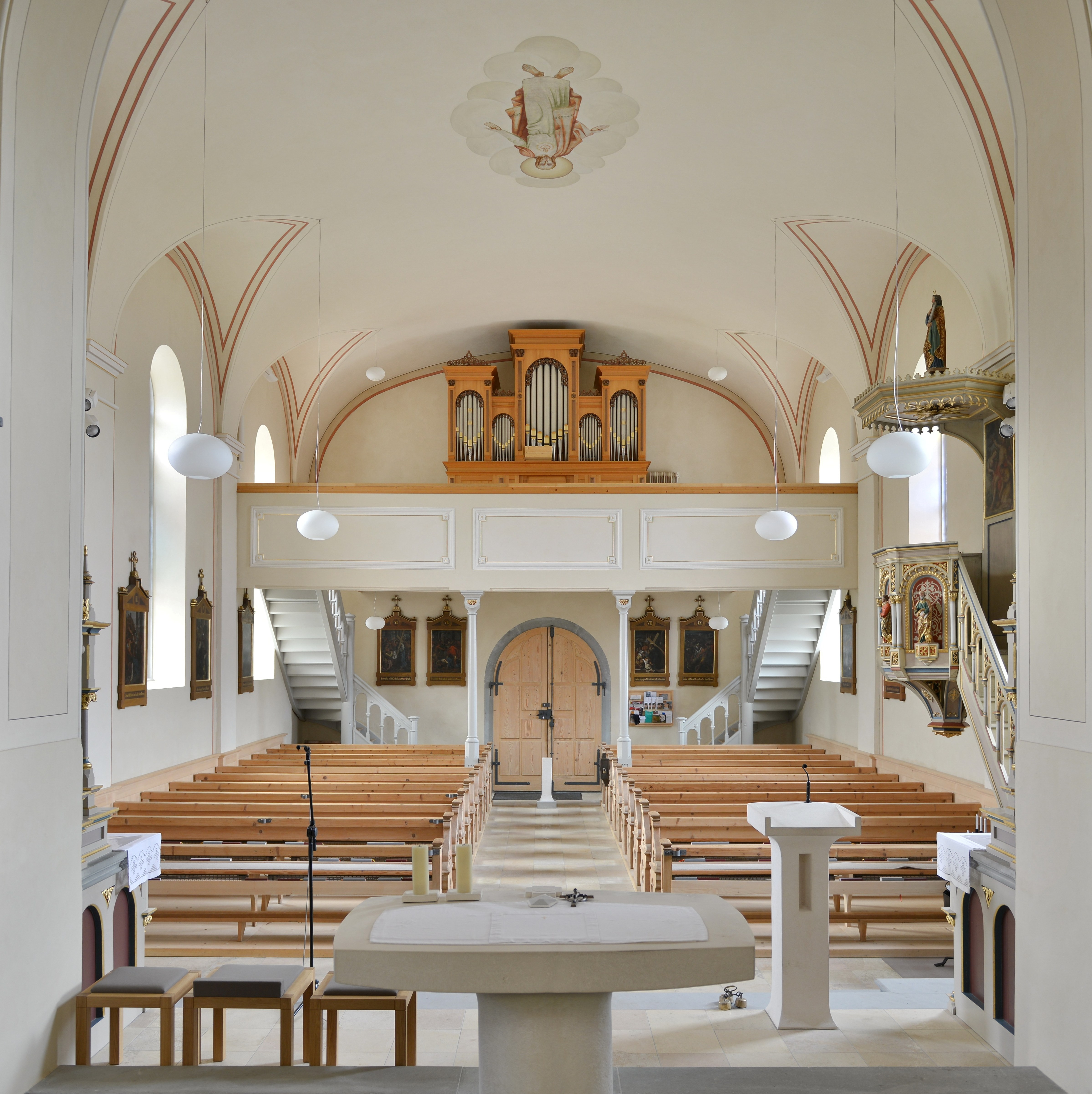 Expositurkirche: Herz Jesu und Mariae in Müselbach, (Alberschwende).